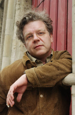 Jo Bogaert hoy.